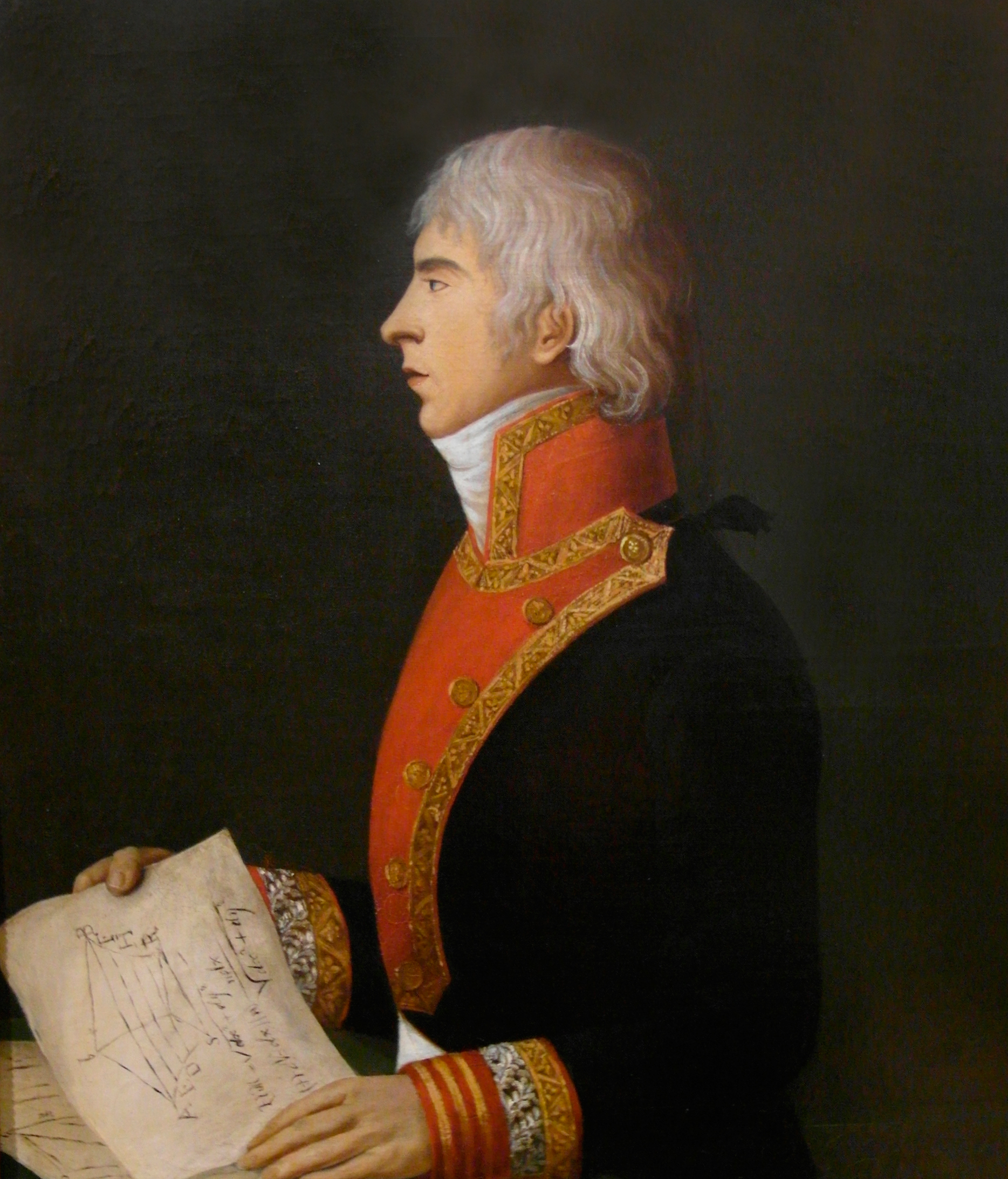 Retrato del marino español Cosme Damián Churruca (1761-1805). This is a retouched picture, which means that it has been digitally altered from its original version. Modifications: Adjusting background flash light issues..